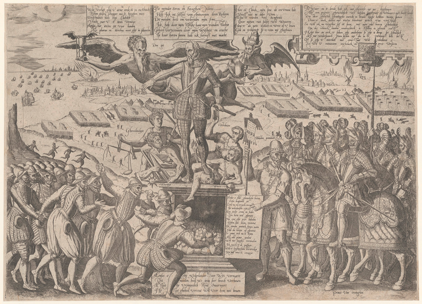 Flugblatt auf das Standbild Herzog Albas in Antwerpen